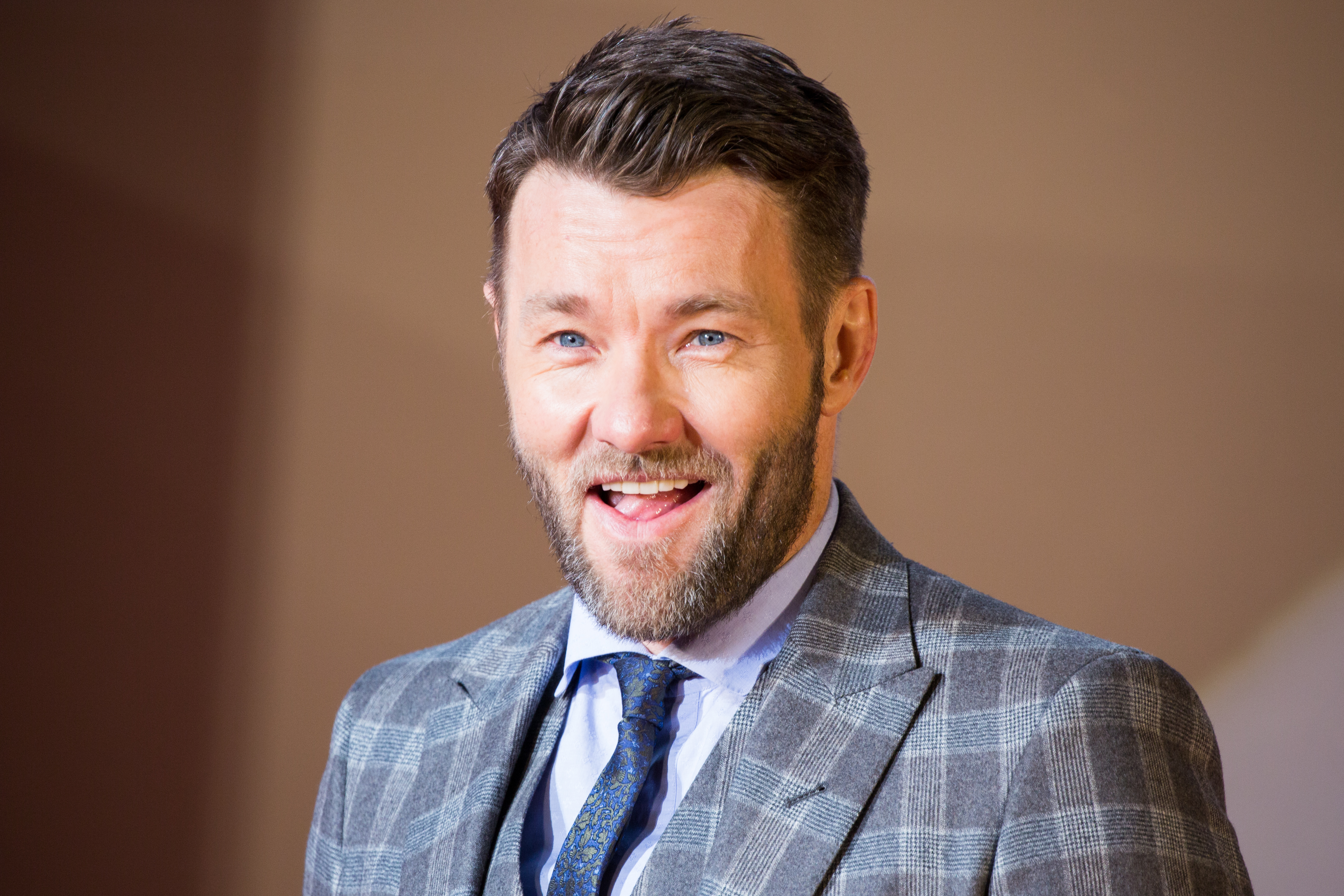 ブライト ジャパン・プレミア レッドカーペット ジョエル・エドガートン